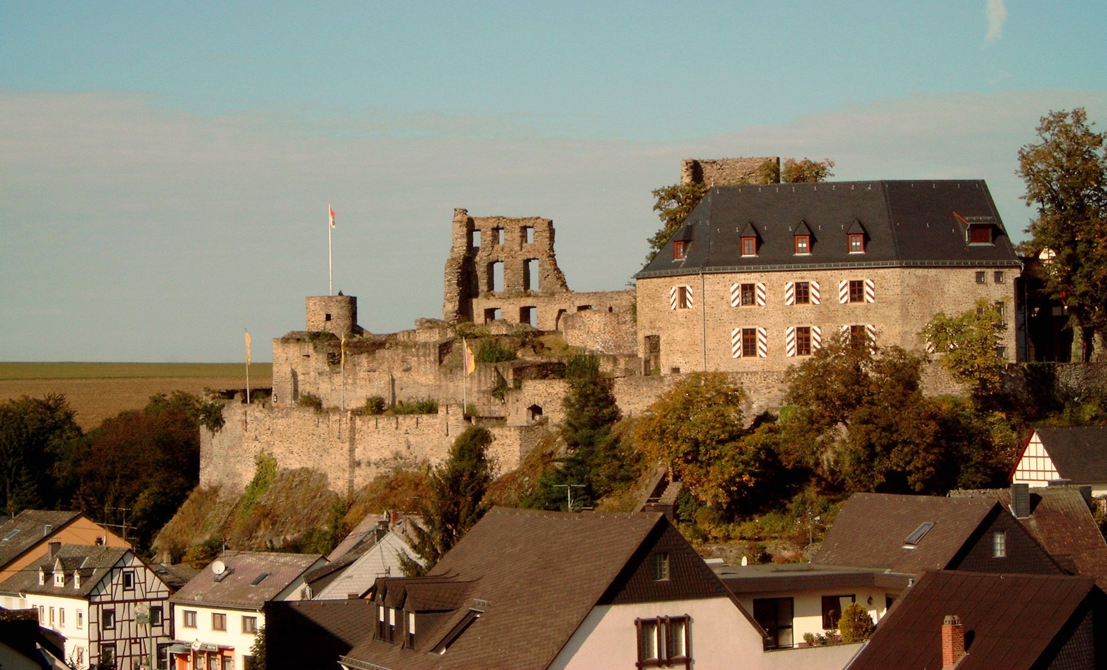 Kastellauner Burg mit Altstadtgebäuden